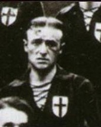 calciatore italiano